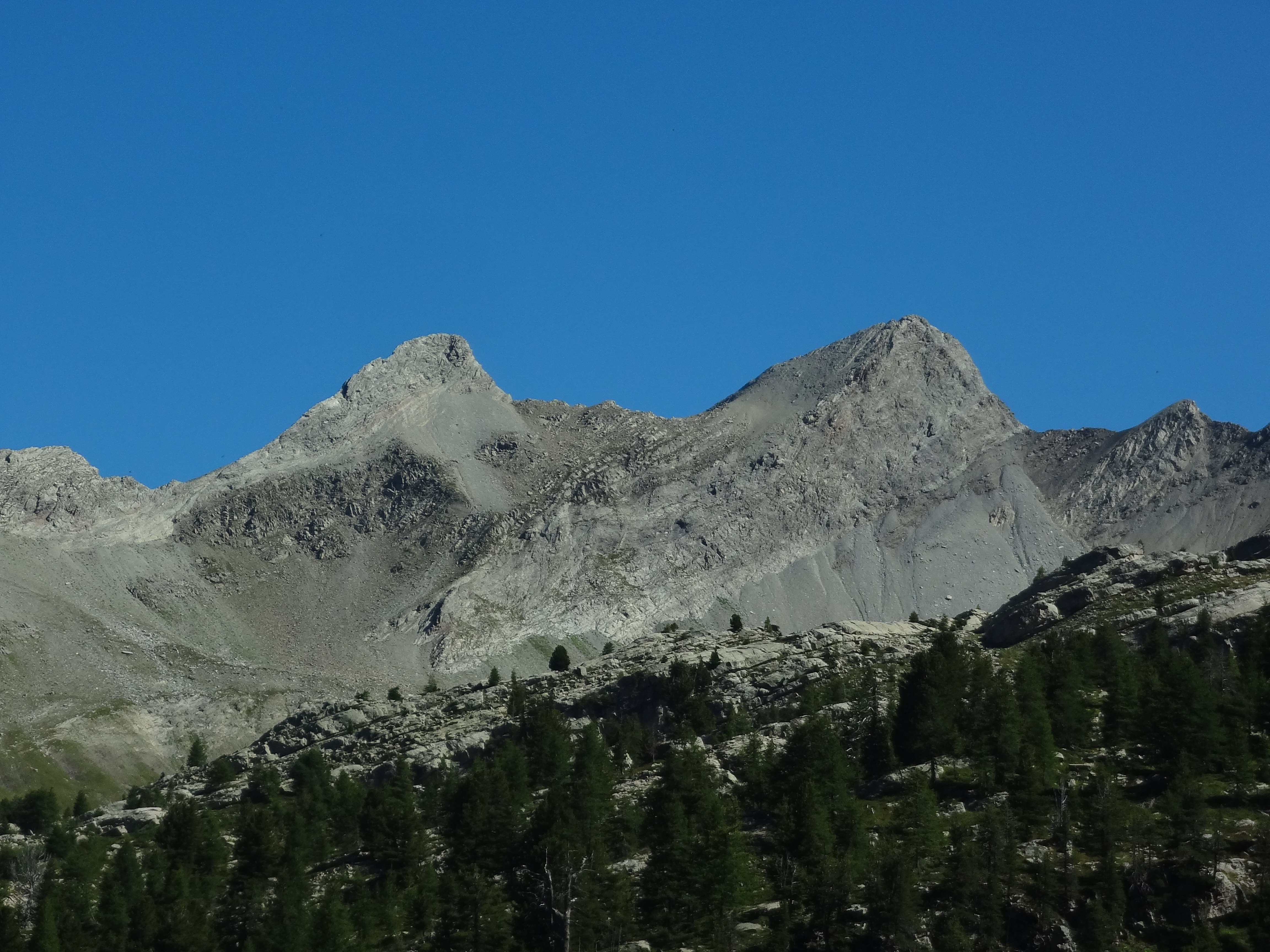 Sommets des Trois-Évêchés (2818 m) et de la Dent des Évêchés (2771 m), vus du Nord-Ouest